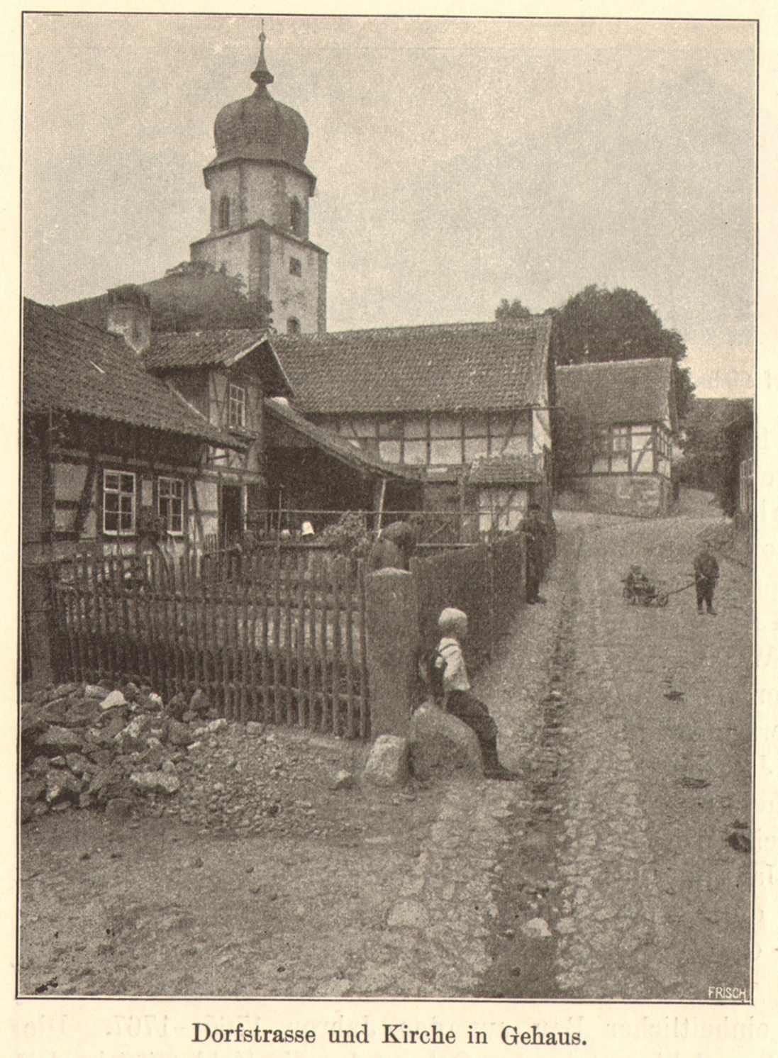 Ansicht der Dorfstraße in Gehaus um 1910.